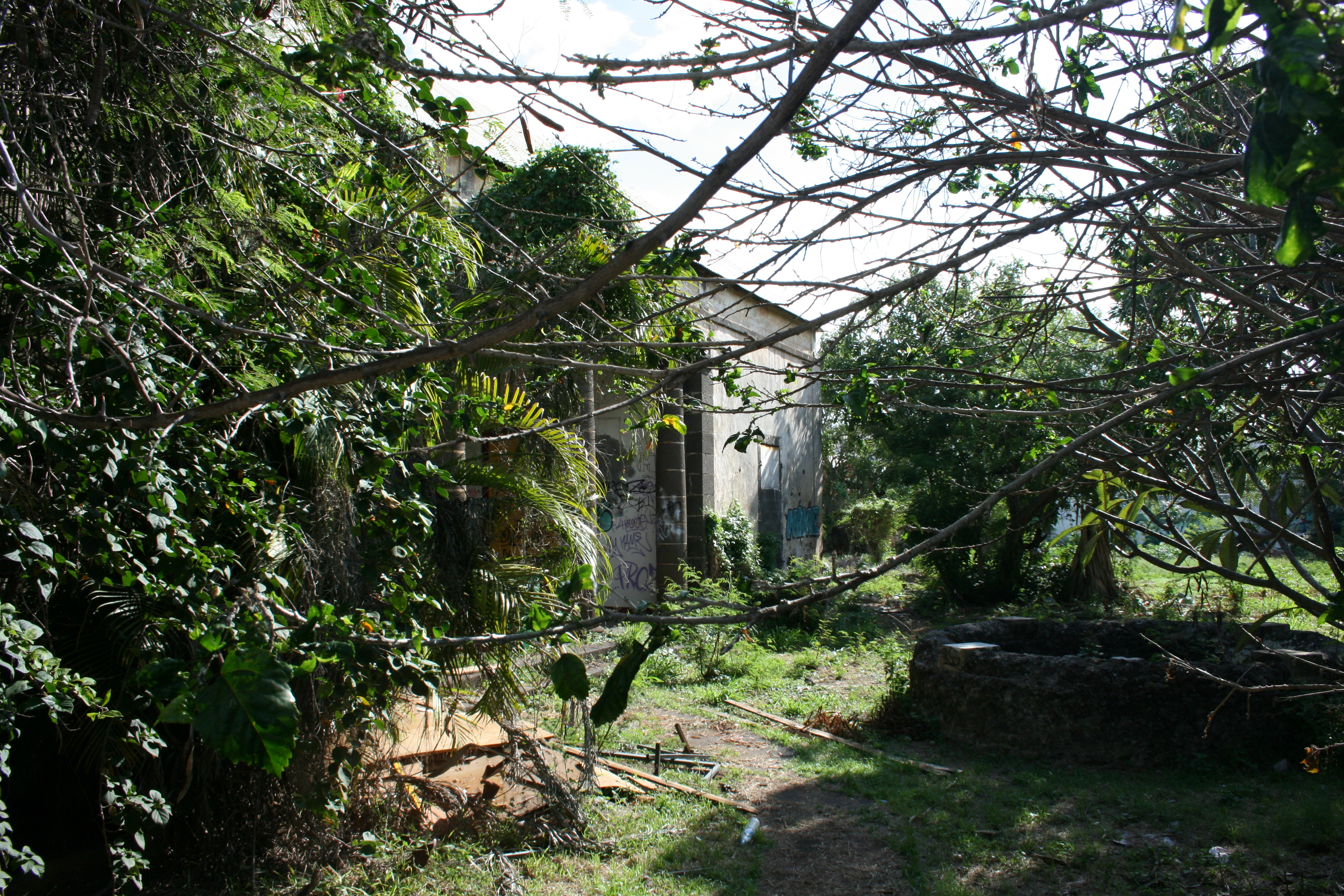 La maison Canonville en ruine, à Saint-Pierre de La Réunion.